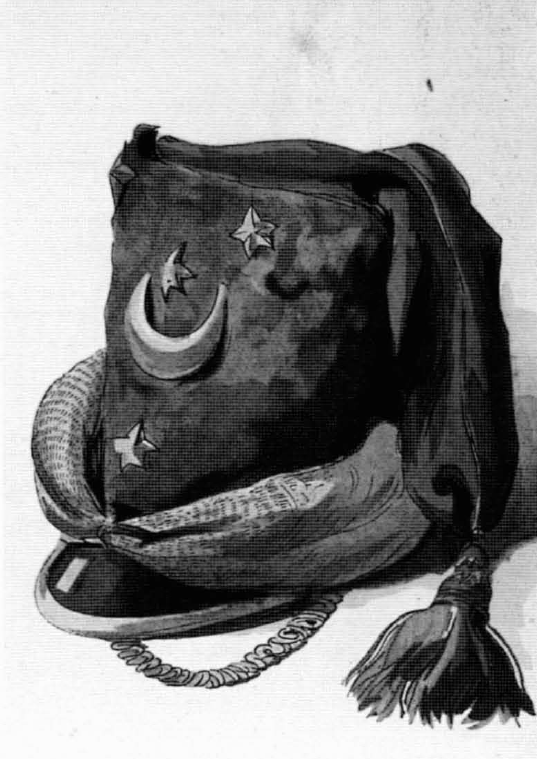 Coiffure d'officier des tartares lituaniens de la Garde impériale.